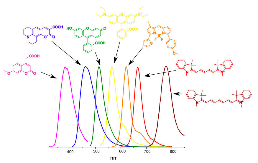 Флуоресцентные красители различной химической природы